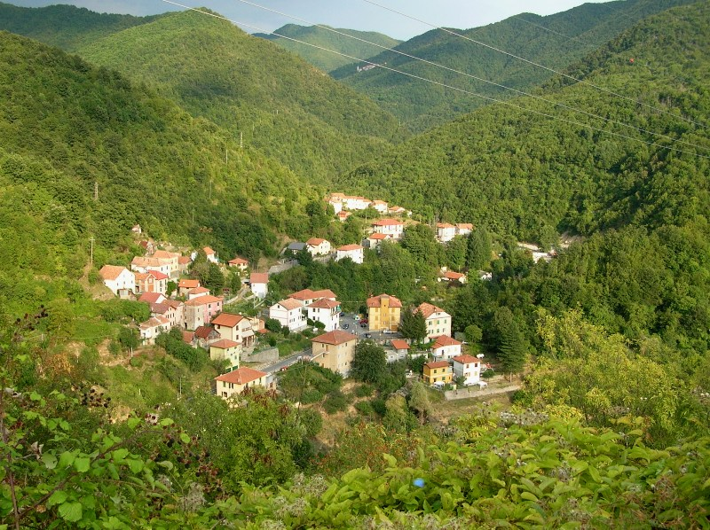 Foto propria Agosto 2008 Valbrevenna (Genova) - Veduta Molino Vecchio